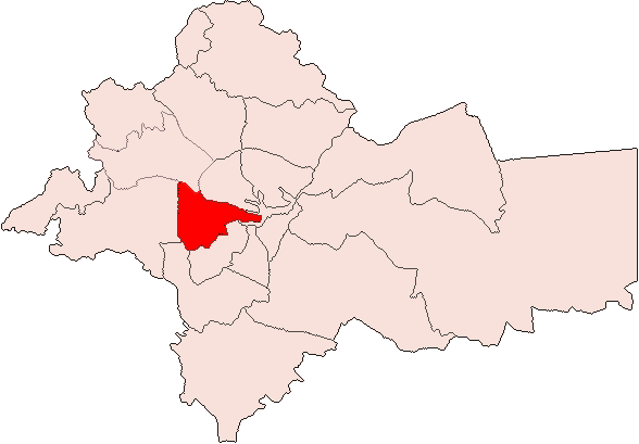 AMMAN-Zahran.png — Maps of Amman User:Tarawneh/rami